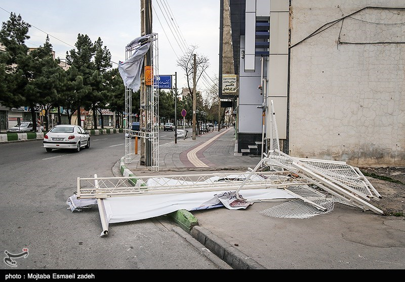 افتادن بیلبورد تبلیغاتی بر اثر طوفان ۱۳۹۷ ارومیه